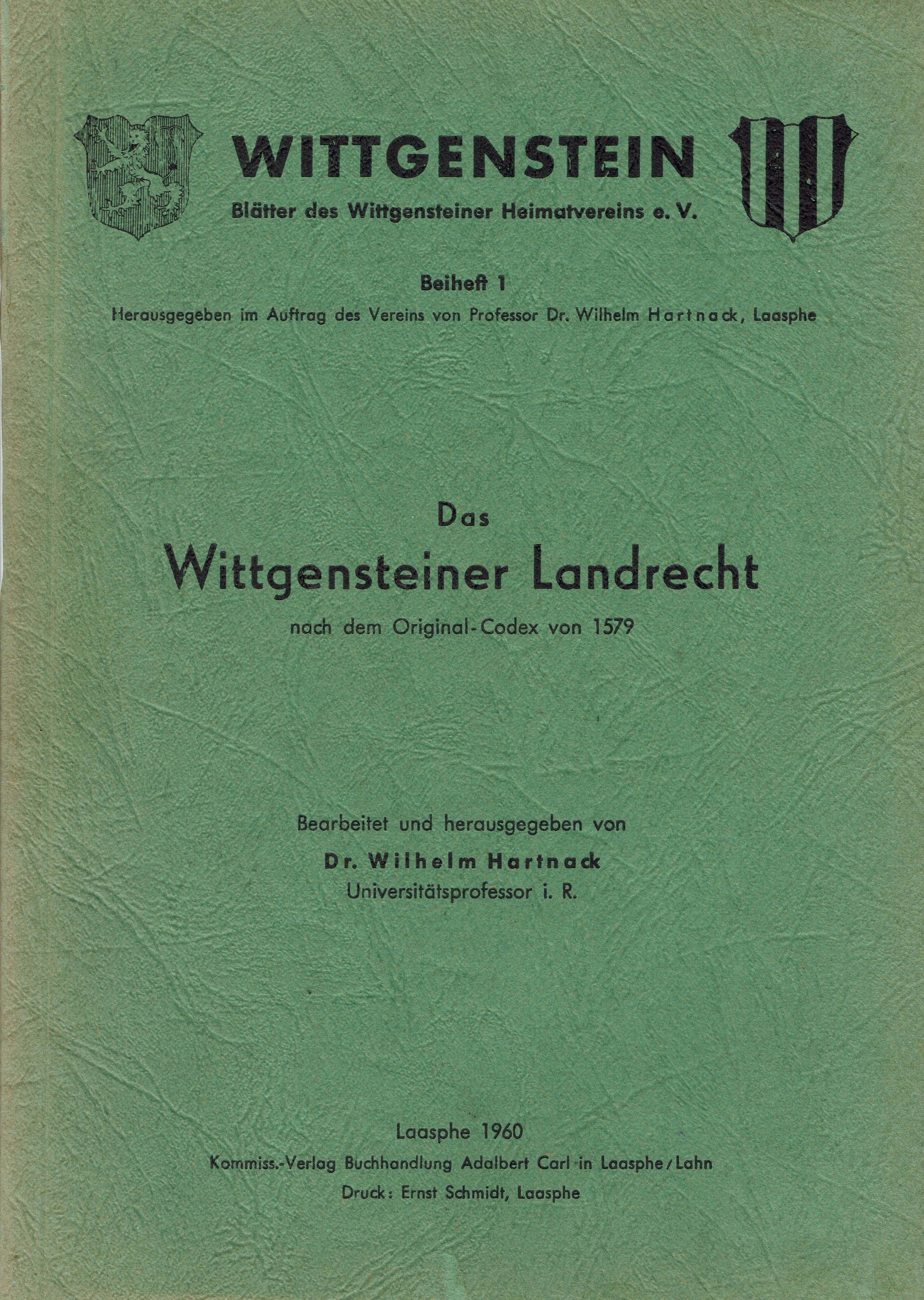 Buchdeckel Blätter des Wittgensteiner Heimatvereins e.V., Beiheft 1: Das Wittgensteiner Landrecht nach dem Original-Codex von 1579